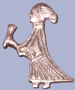 Valkyrie figurine in silver